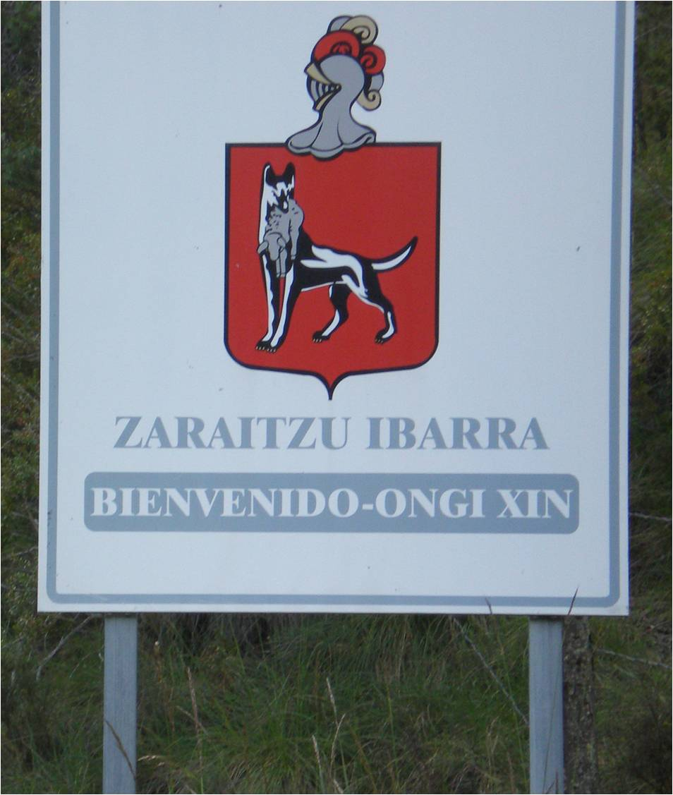 Zaraitzuko sarreran dagoen kartela